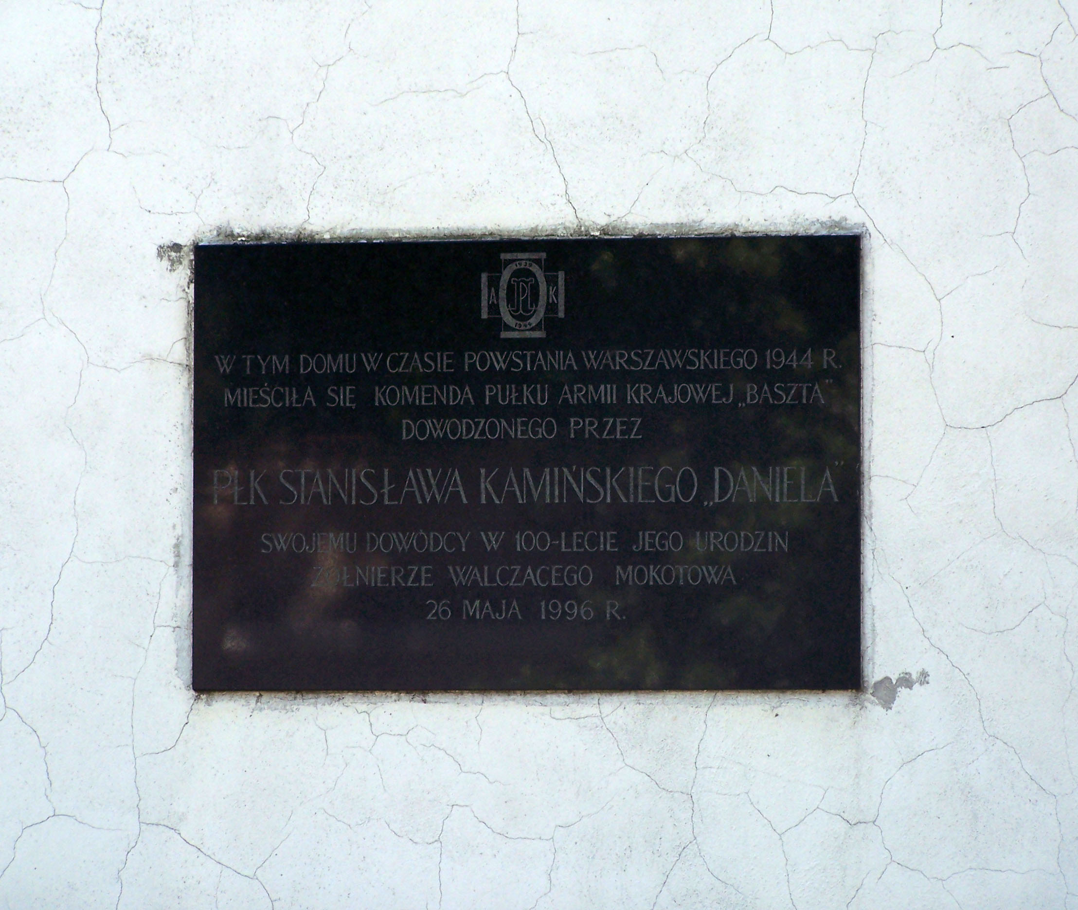 Memorial plaque to Col. Stanisław Kamiński "Daniel", soldier of the Home Army (Armia Krajowa), in Warsaw-Mokotów, Poland